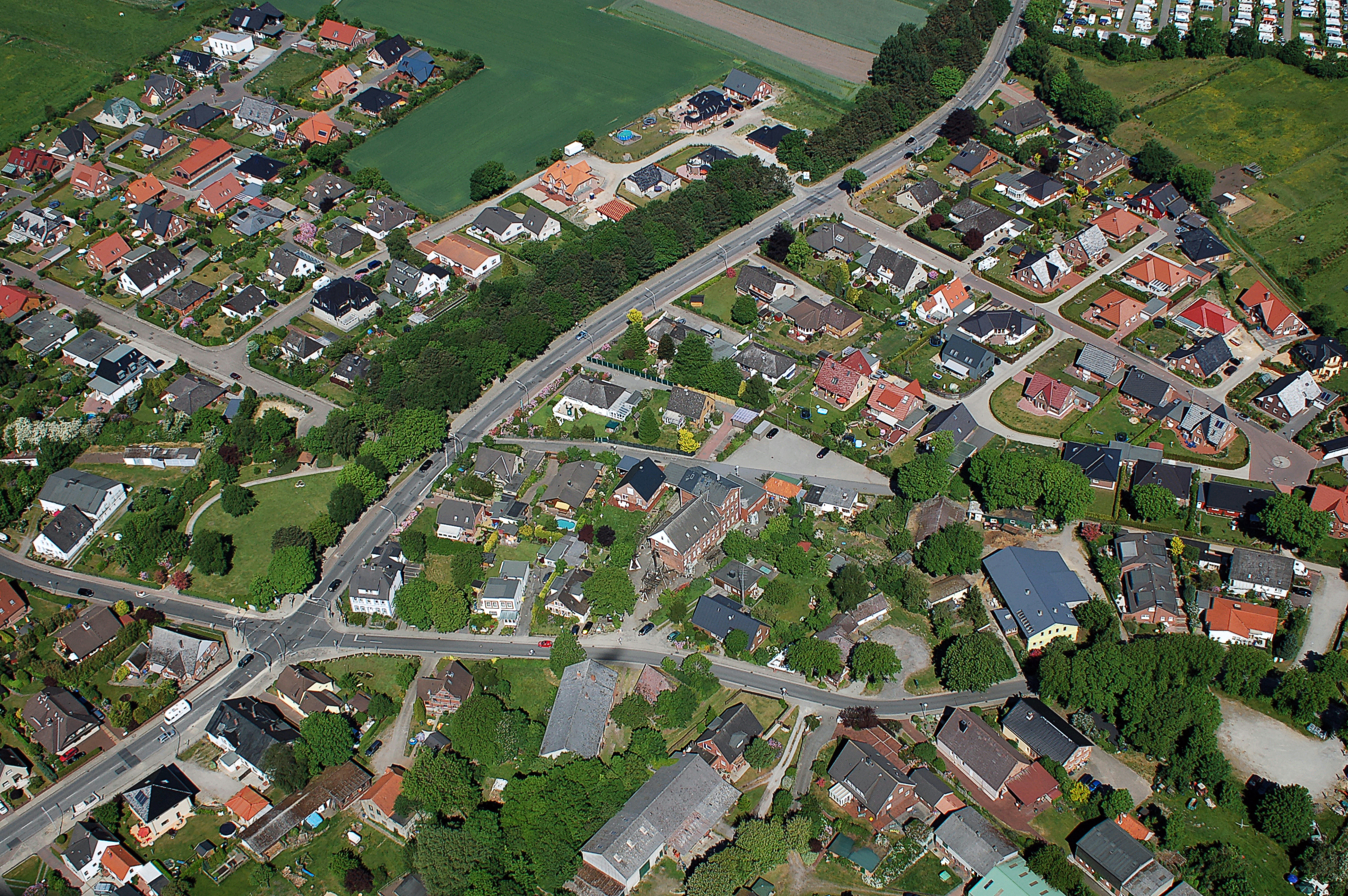 Cuxhaven-Stickenbüttel. Die diagonal durch Bild laufende Hauptstraße ist der Windeichenweg (K 2).